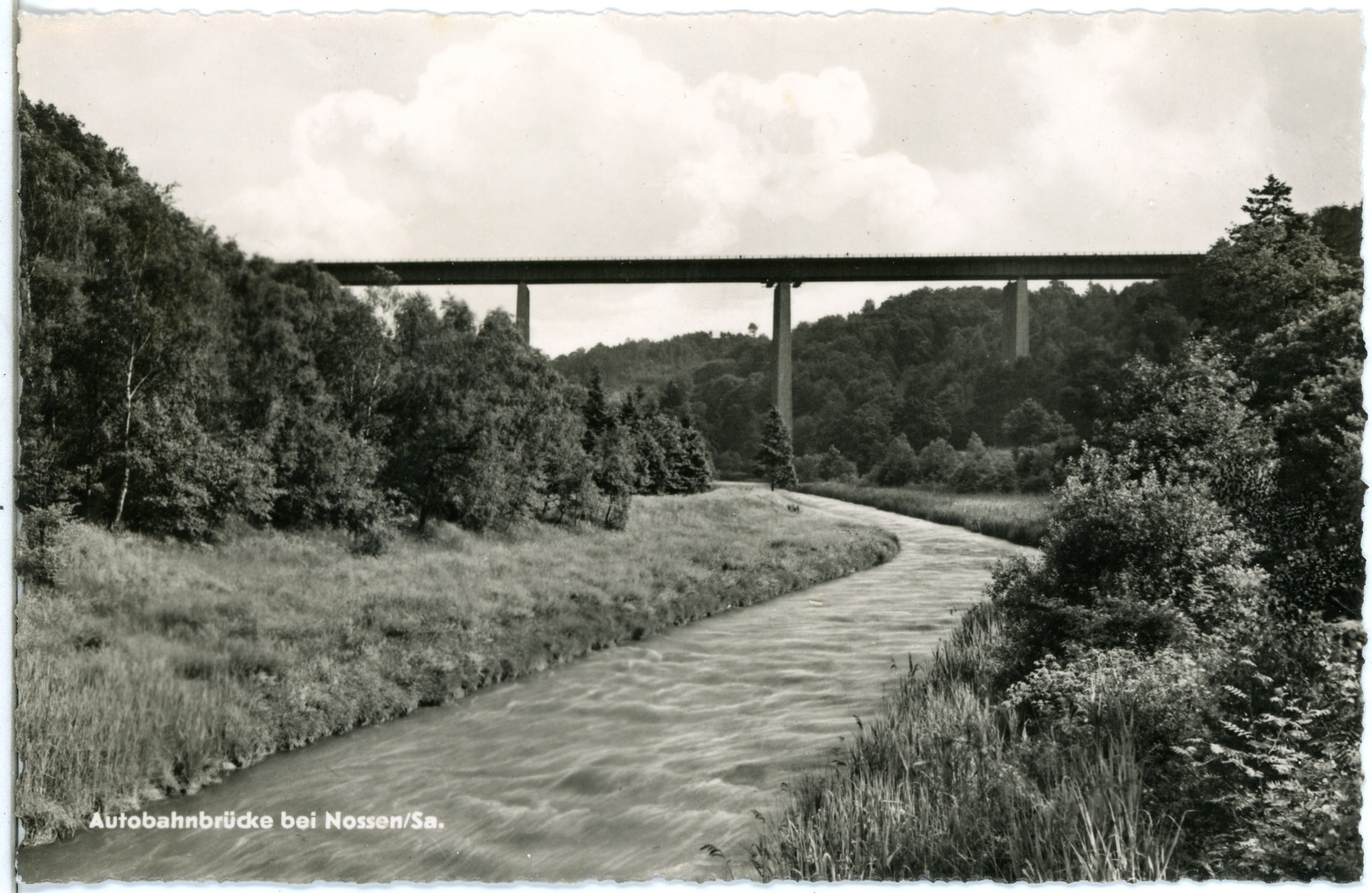 Nossen; Autobahnbrücke This postcard is from publisher Brück & Sohn in Meißen ( postcard has a unique number 29766 and is available in a higher resolution at the publisher. This images was uploaded in a cooperation project between Wikipedians and the publisher.